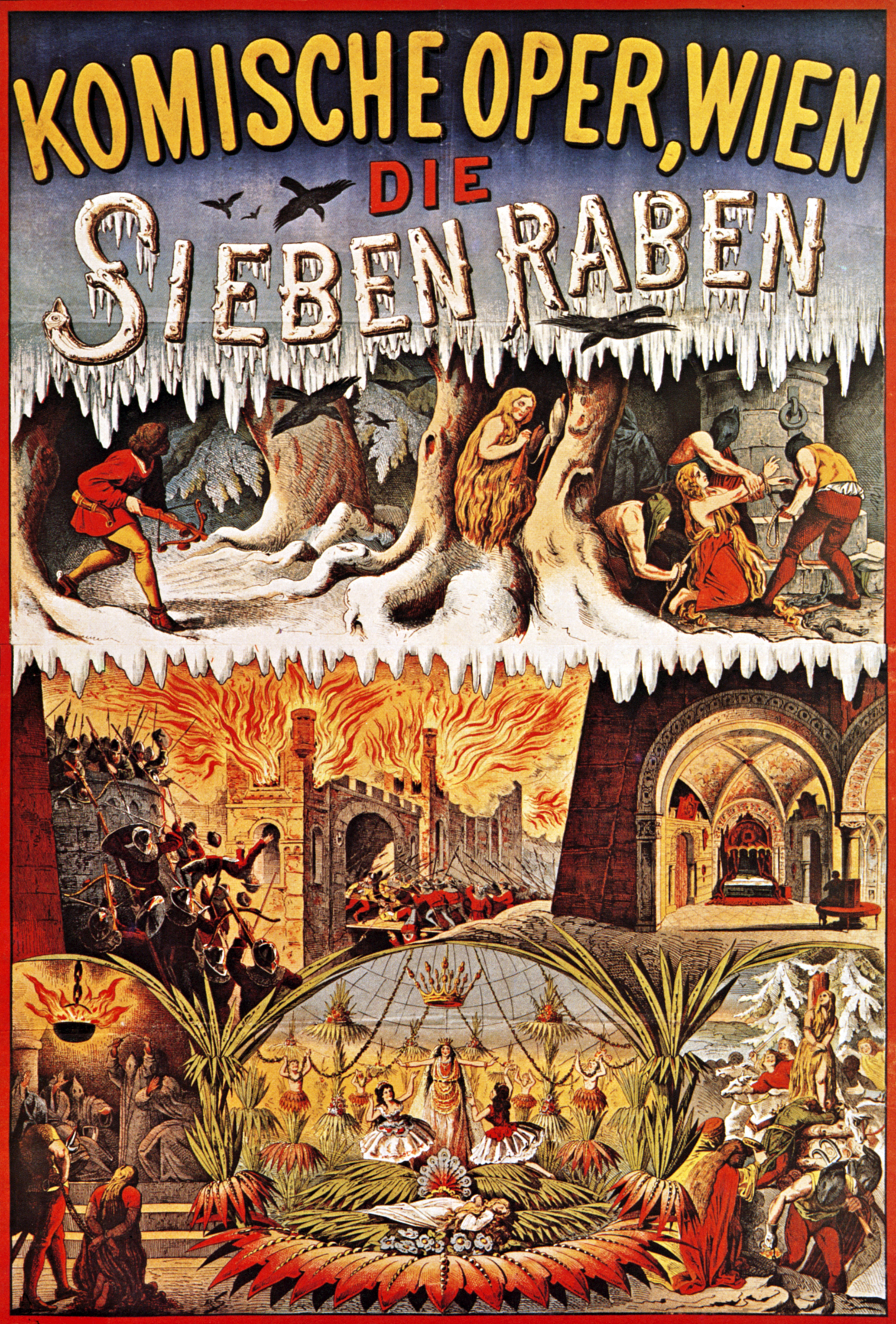 Komische Oper, Wien, Theaterplakat Die Sieben Raben